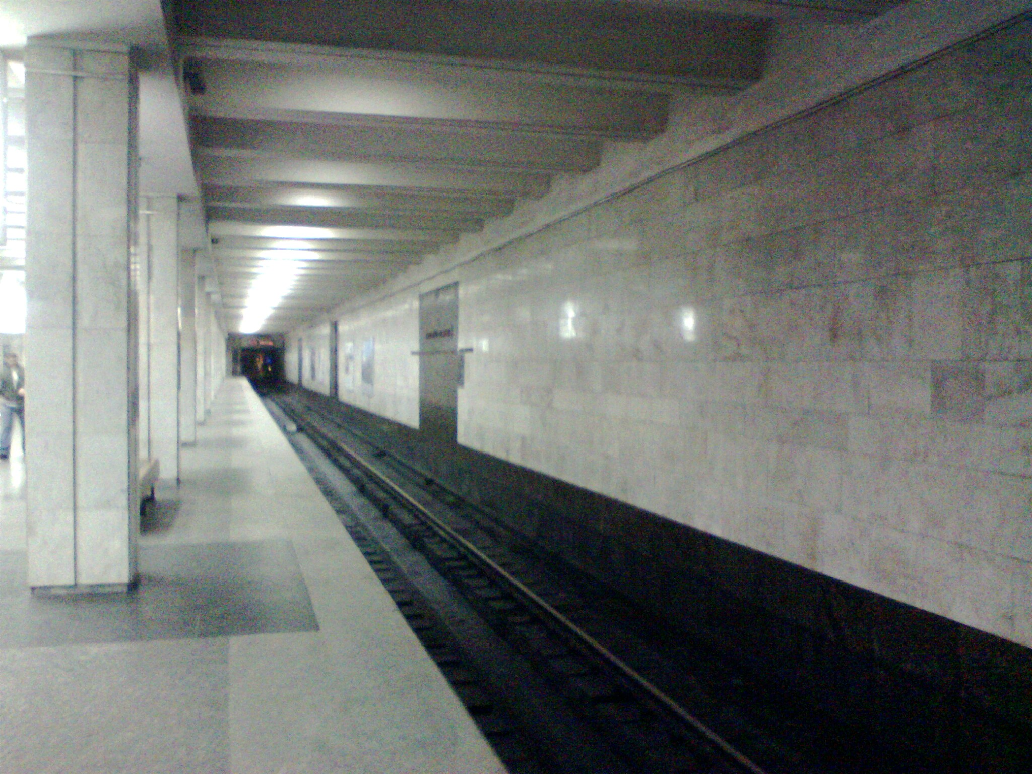 Posadochnaua platforma Gagarina